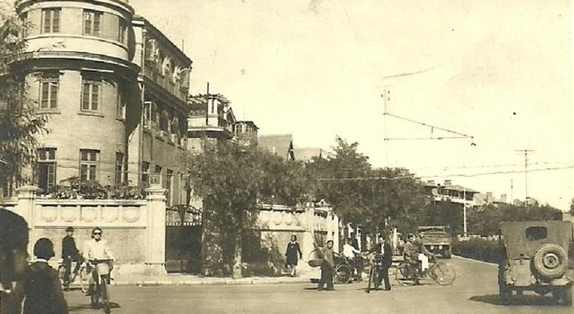 1945年马场道与新华路交口